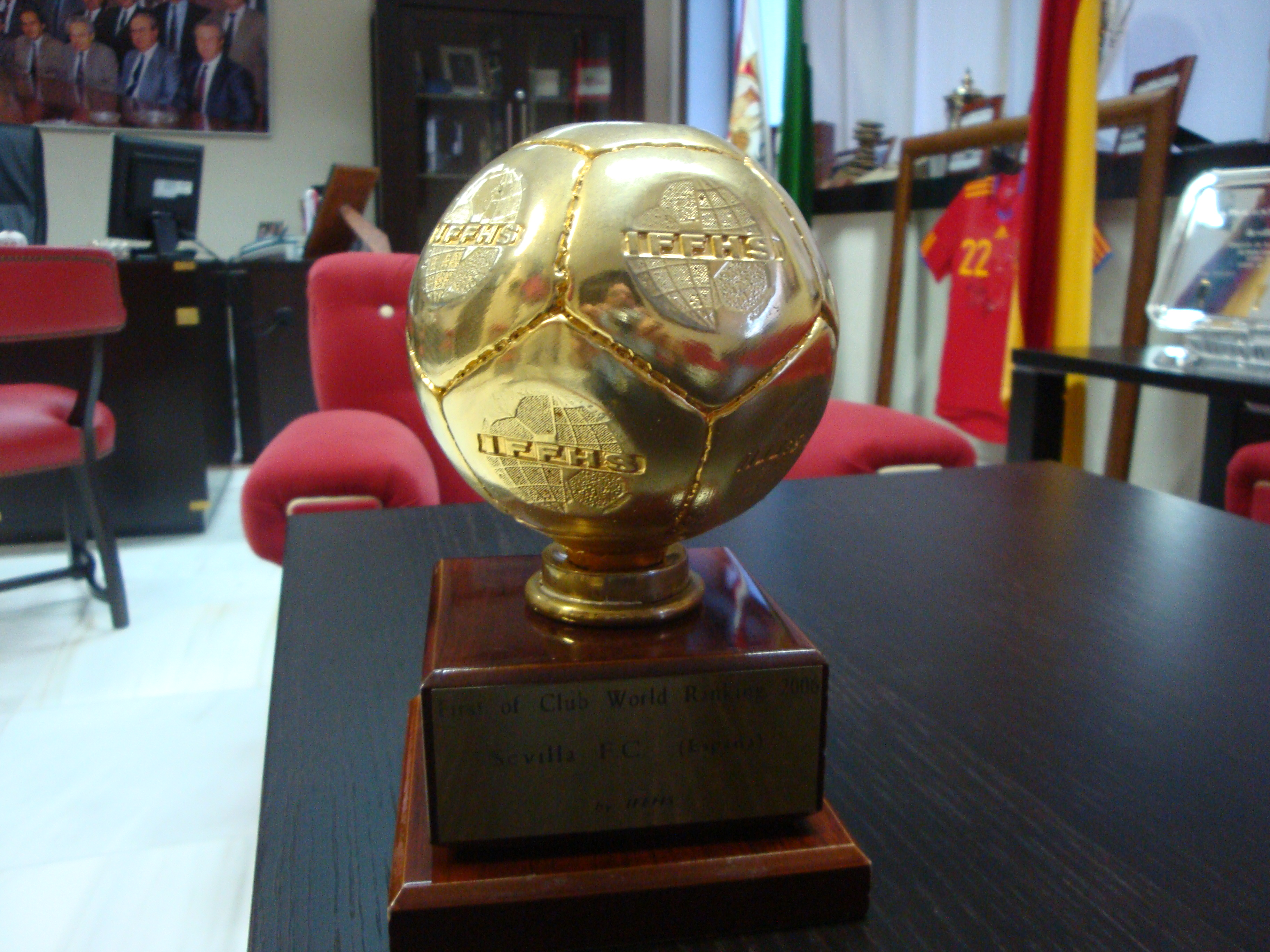 Trofeo mejor equipo del mundo concedido al Sevilla F C en 2006 y 2007